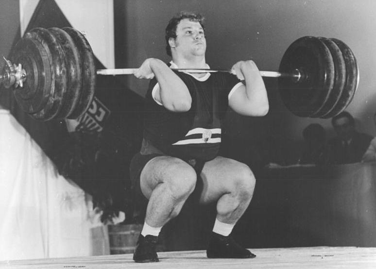 Gerd Bonk ADN-ZB Demme 29.09.1974 Manila: Bronze für Gerd Bonk im Reißen-Am letzten Tag der Gewichtheberweltmeisterschaften in Manila holte sich der Karl-Marx-Städter Superschwergewichtler Gerd Bonk (Archivfoto) die Bronzemedaille im Reißen. Bonk bewältigte 172,5 kg und stellte damit den von Manfred Rieger gehaltenen DDR-Rekord ein.